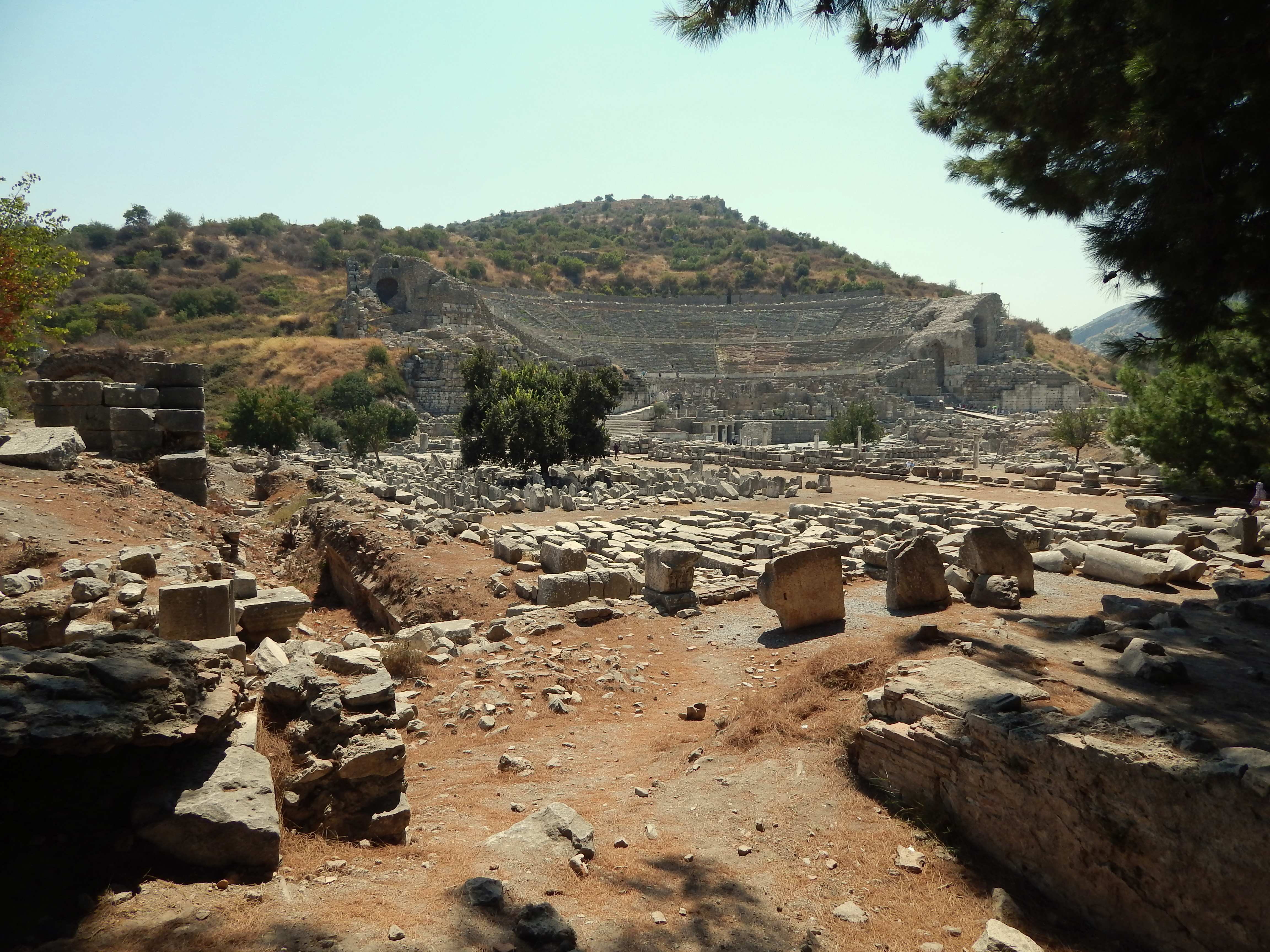 Büyük Tiyatro...